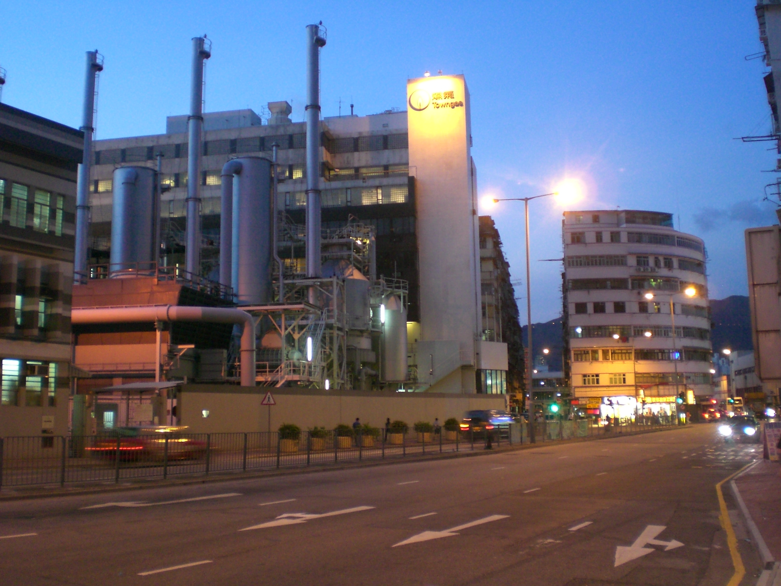 九龍城區, 土瓜灣道